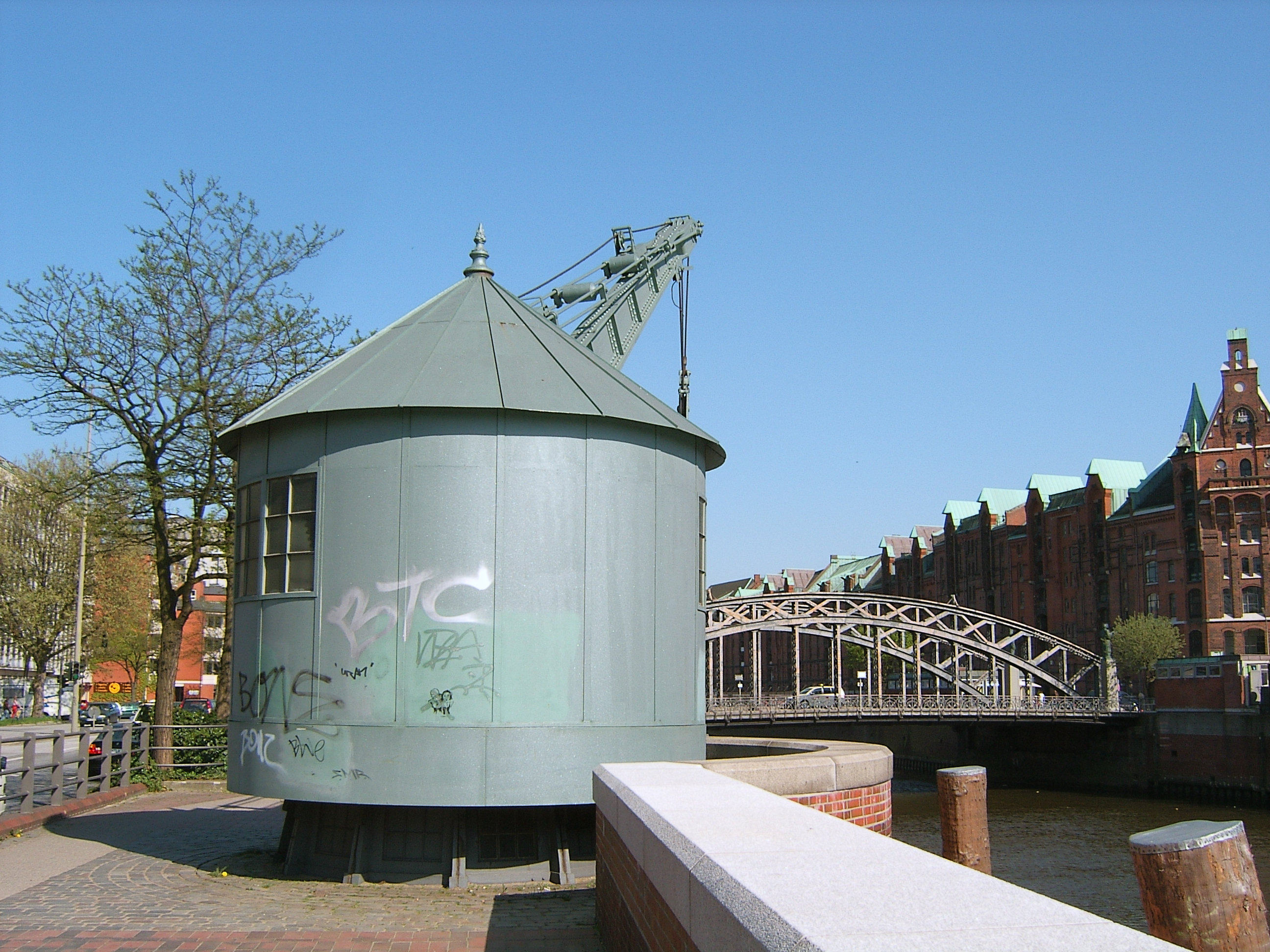 Der Neue Krahn von 1858 steht in der gleichnamigen Straße, direkt am Zollkanal in Hamburg-Altstadt. This is a photograph of an architectural monument.